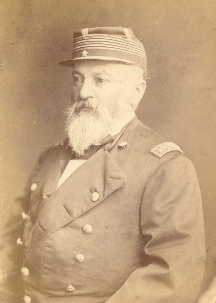 Coronel Emilio Sotomayor. ca. 1880